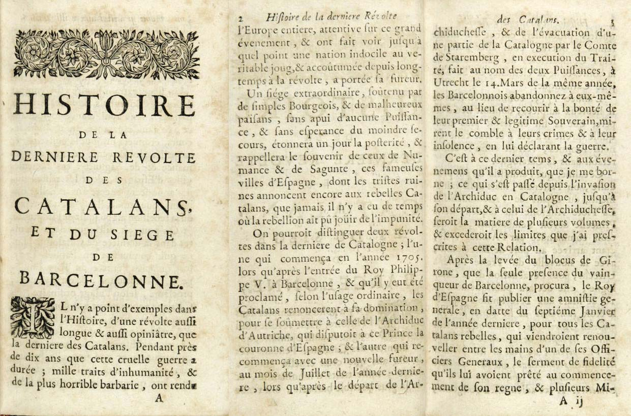 istoire de la derniere revolte des catalans et du siege de Barcelonne